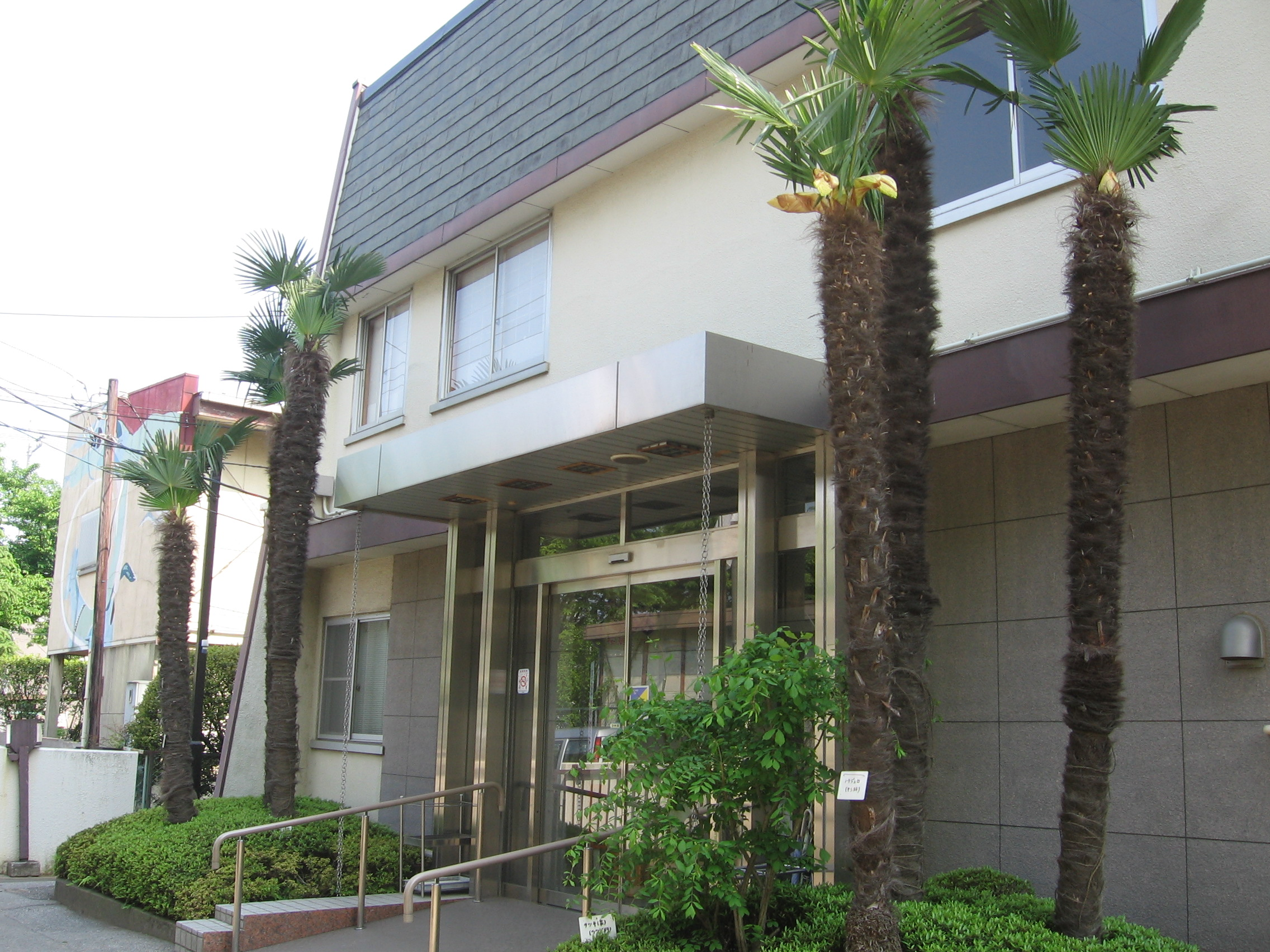 Shibahuji-Kominkan in Kawaguchi,Japan